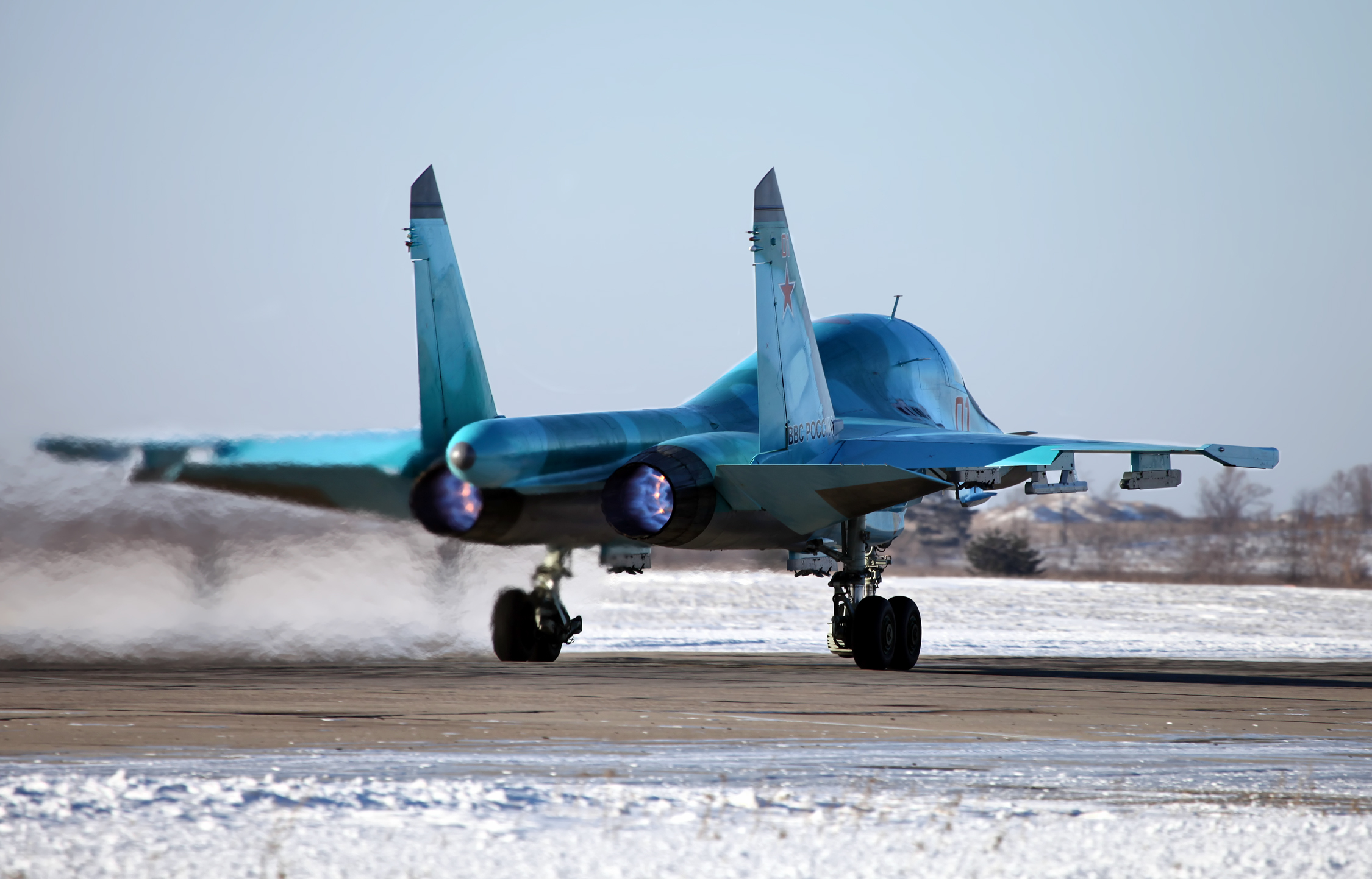 Су-34 бортовой номер 01 Красный (Su-34 01 Red)